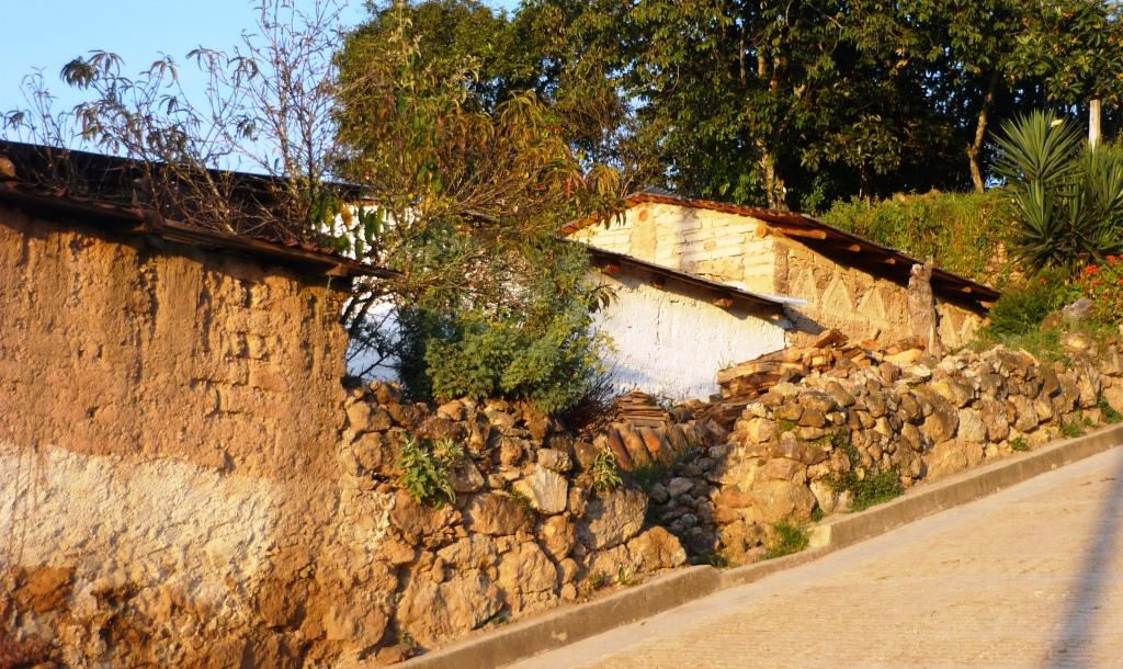 NHAC: Catalogación, investigación, reparación de patrimonio arquitectónico